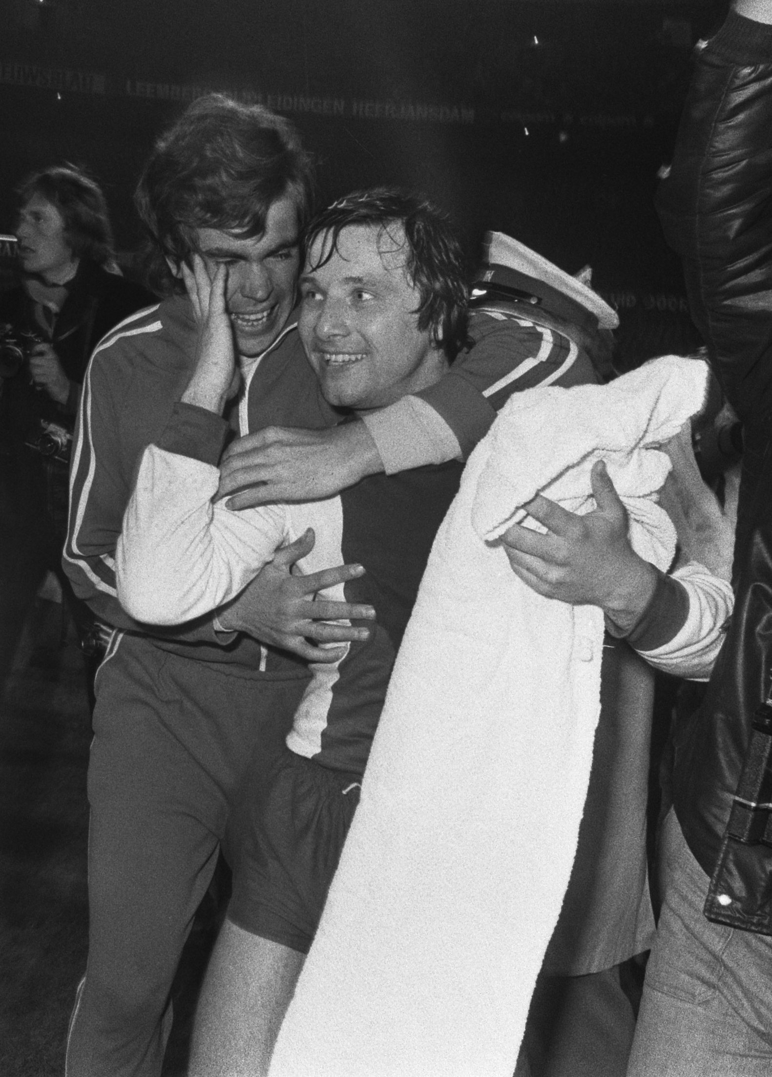 Collectie / Archief : Fotocollectie Anefo Reportage / Serie : [ onbekend ] Beschrijving : AC Milan tegen FC Magdeburg 0-2, finale Europacup II trainer FC Magdeburg met spelers Datum : 8 mei 1974 Trefwoorden : SPELERS, finales, sport, trainers, voetbal Persoonsnaam : Fc Magdeburg Instellingsnaam : AC Milaan Fotograaf : Verhoeff, Bert / Anefo Auteursrechthebbende : Nationaal Archief Materiaalsoort : Negatief (zwart/wit) Nummer archiefinventaris : bekijk toegang 2.24.01.05 Bestanddeelnummer : 927-1803